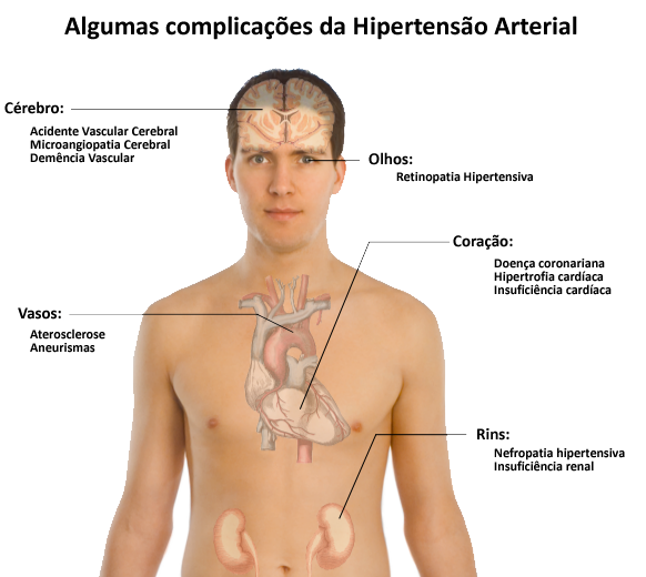 Complicações da hipertensão arterial. Sources are found in main article: Wikipedia:Hipertensão arterial#complicações. Model: Mikael Häggström. To discuss image, please see Template_talk:Häggström diagrams. To edit this version, you may use the svg version, convert to png and update both versions online. To make other versions, e.g. in other languages, do what you like.